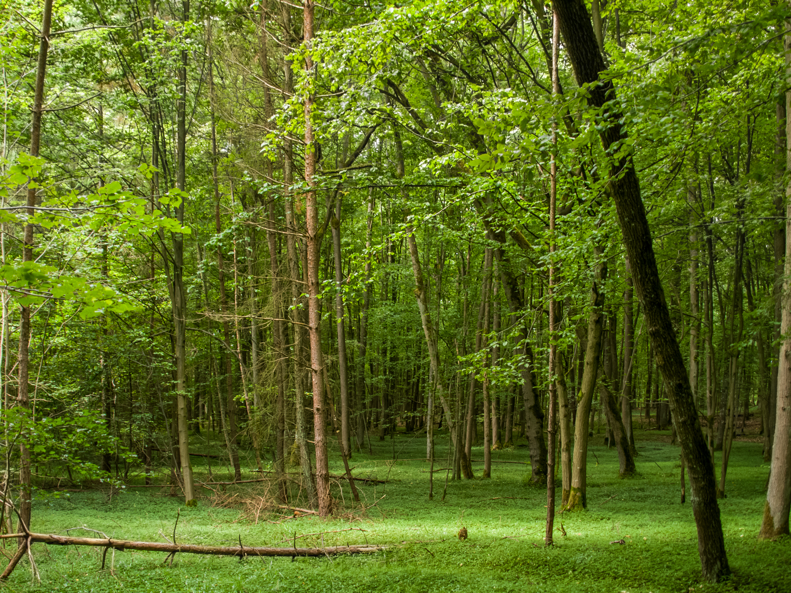 Naturschutzgebiet „Naturwaldreservat Wolfsruhe“ (NSG 00301.01)